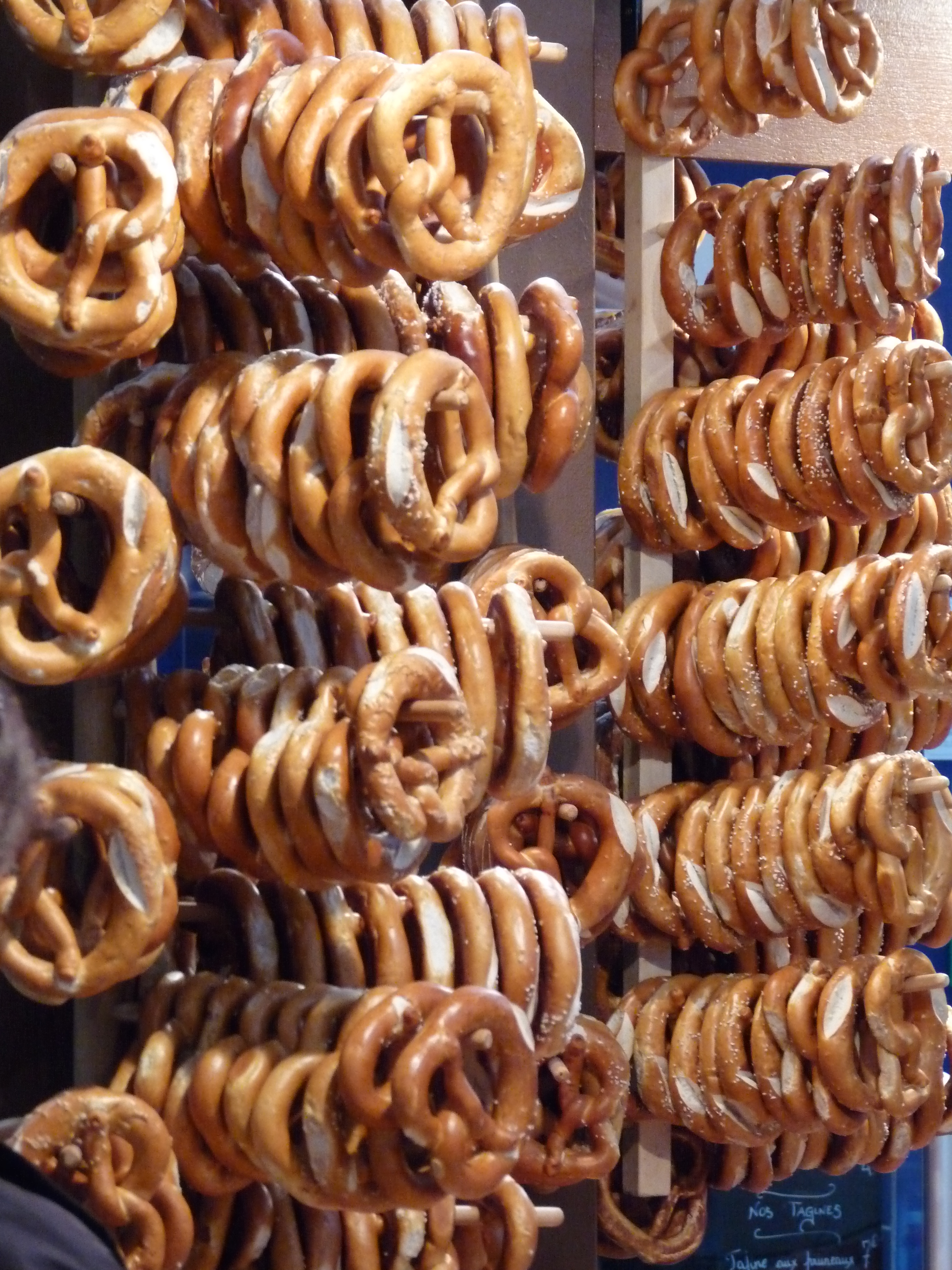 Pretzels 01